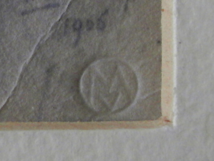 Merkteken Van Meurs op isografie van J. Toorop